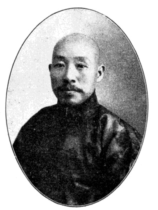 中華民國國會議員